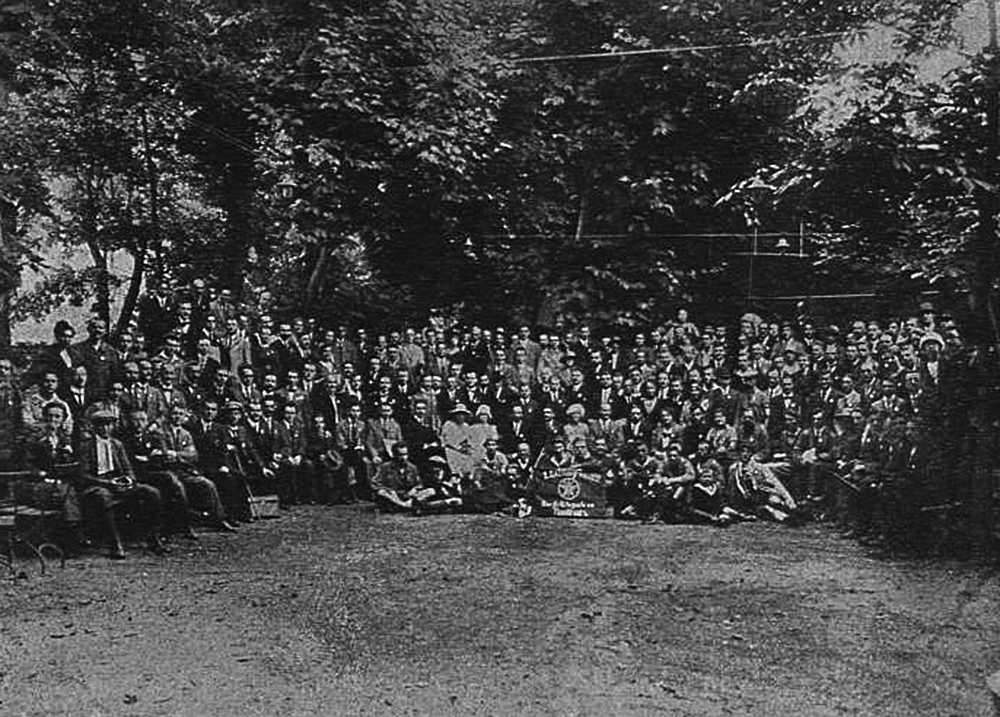 Dua SAT-kongreso en Frankfurto, aŭgusto 1922. Komuna foto.